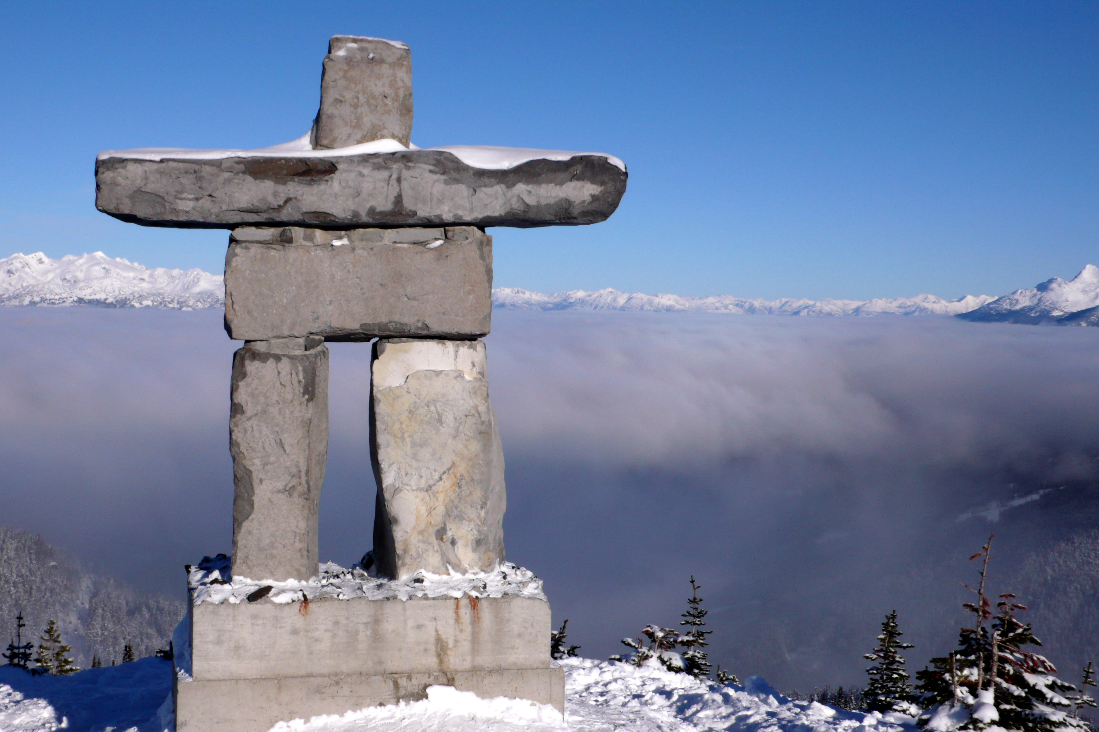 Whistler Peak's Inukshuk